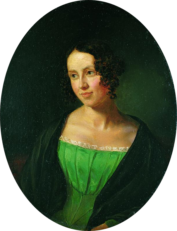 Depicted person: Regine Olsen